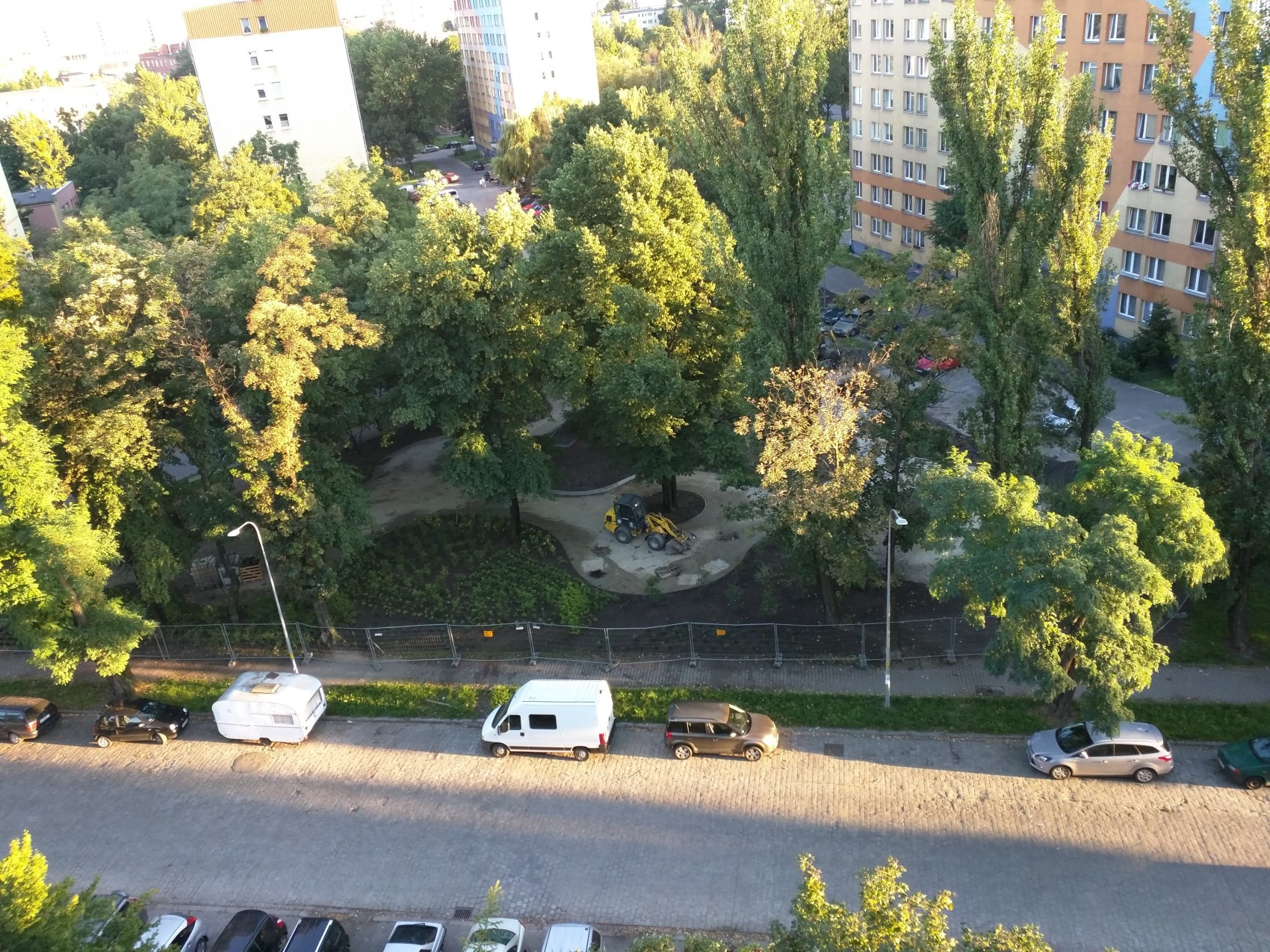 aranżacja zieleni w ramach Wrocławskiego Budżetu Obywatelskiego na Skwerze Ptasi Zagajnik